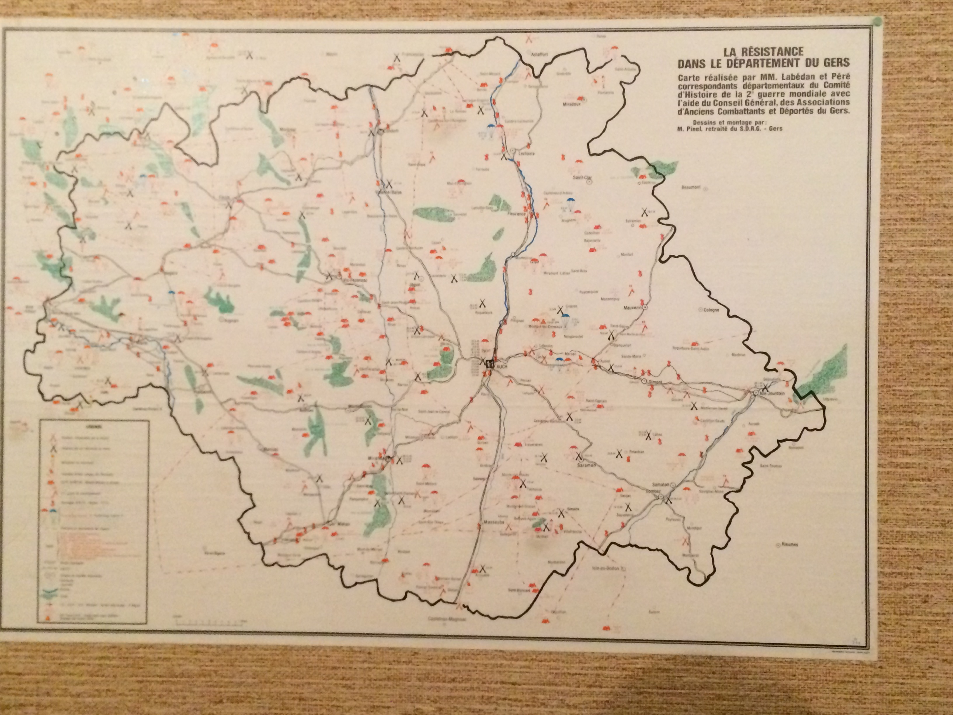 Carte sur laquelle les lieux de résistance dans le département du Gers apparaissent